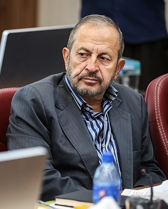 سردار علیرضا افشار رئیس هیئت عالی اندیشه‌ورزی سپاه در نشست کارگروه‌های تخصصی ستاد چهلمین سالگرد انقلاب اسلامی